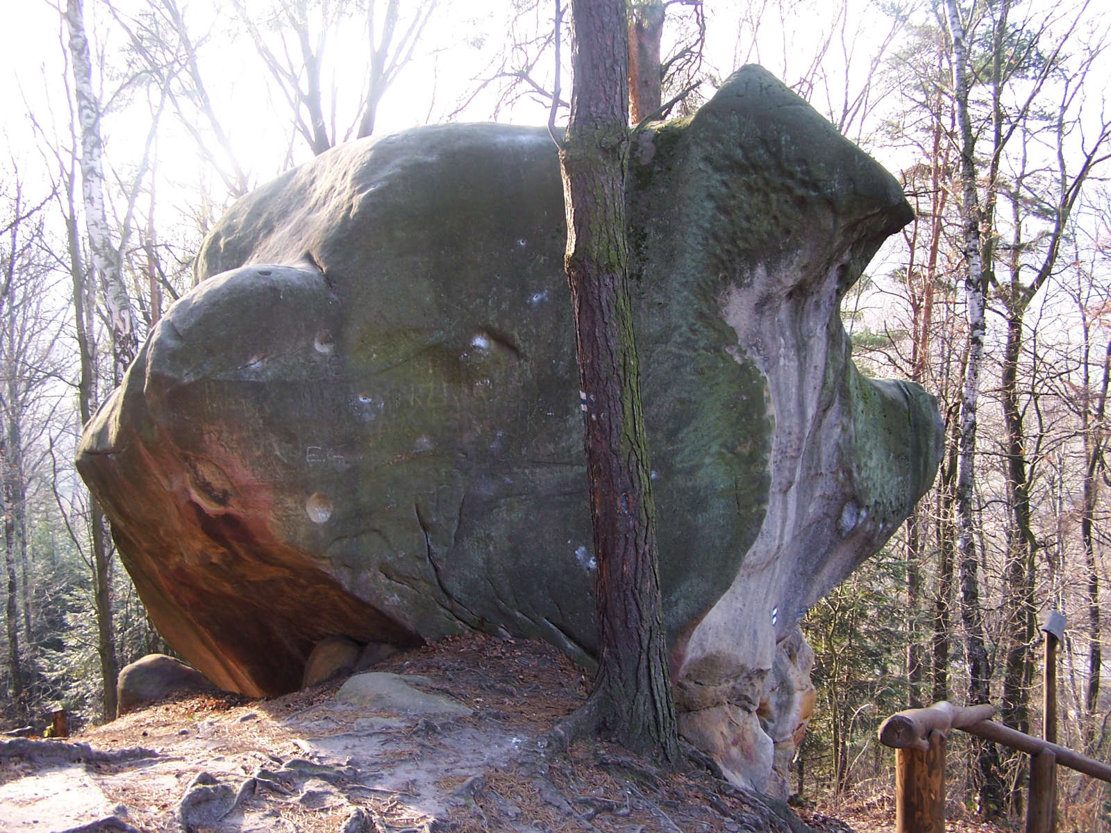 Skamieniałe Miasto (Pogórze Rożnowskie)